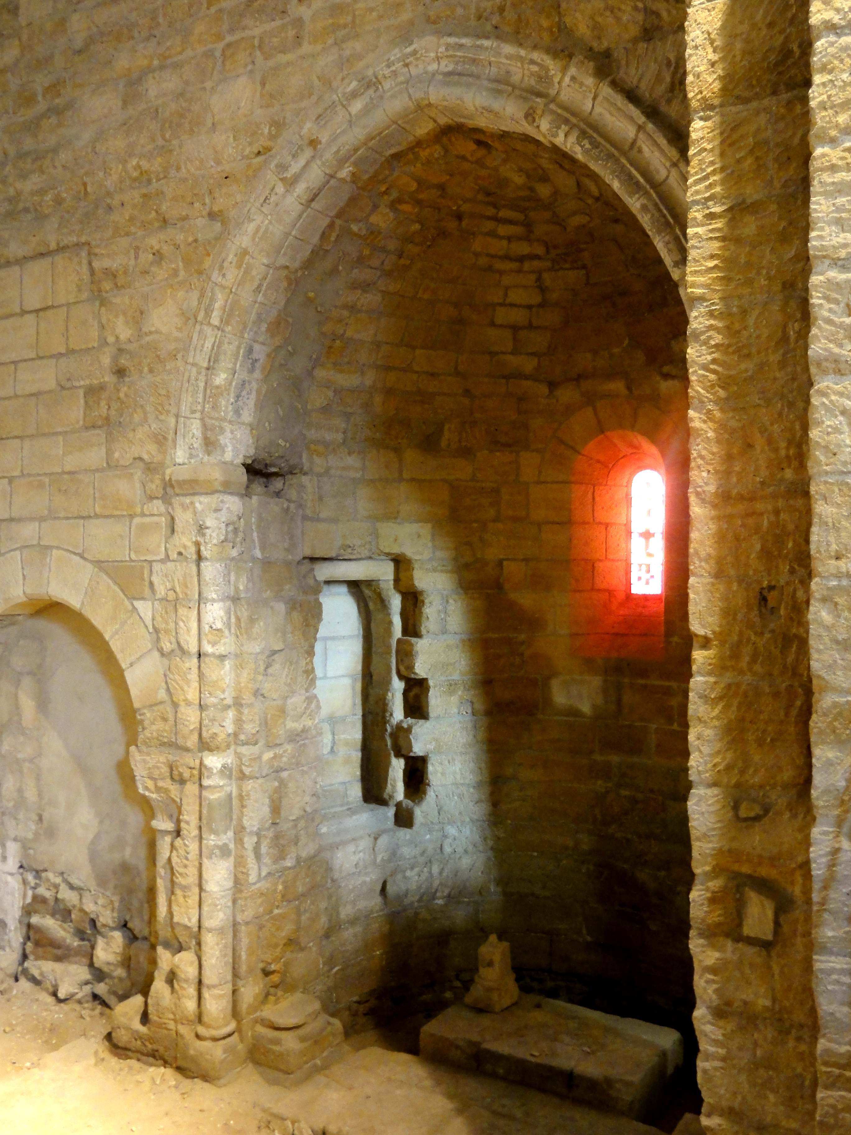 Intérieur de l'église - voir titre.